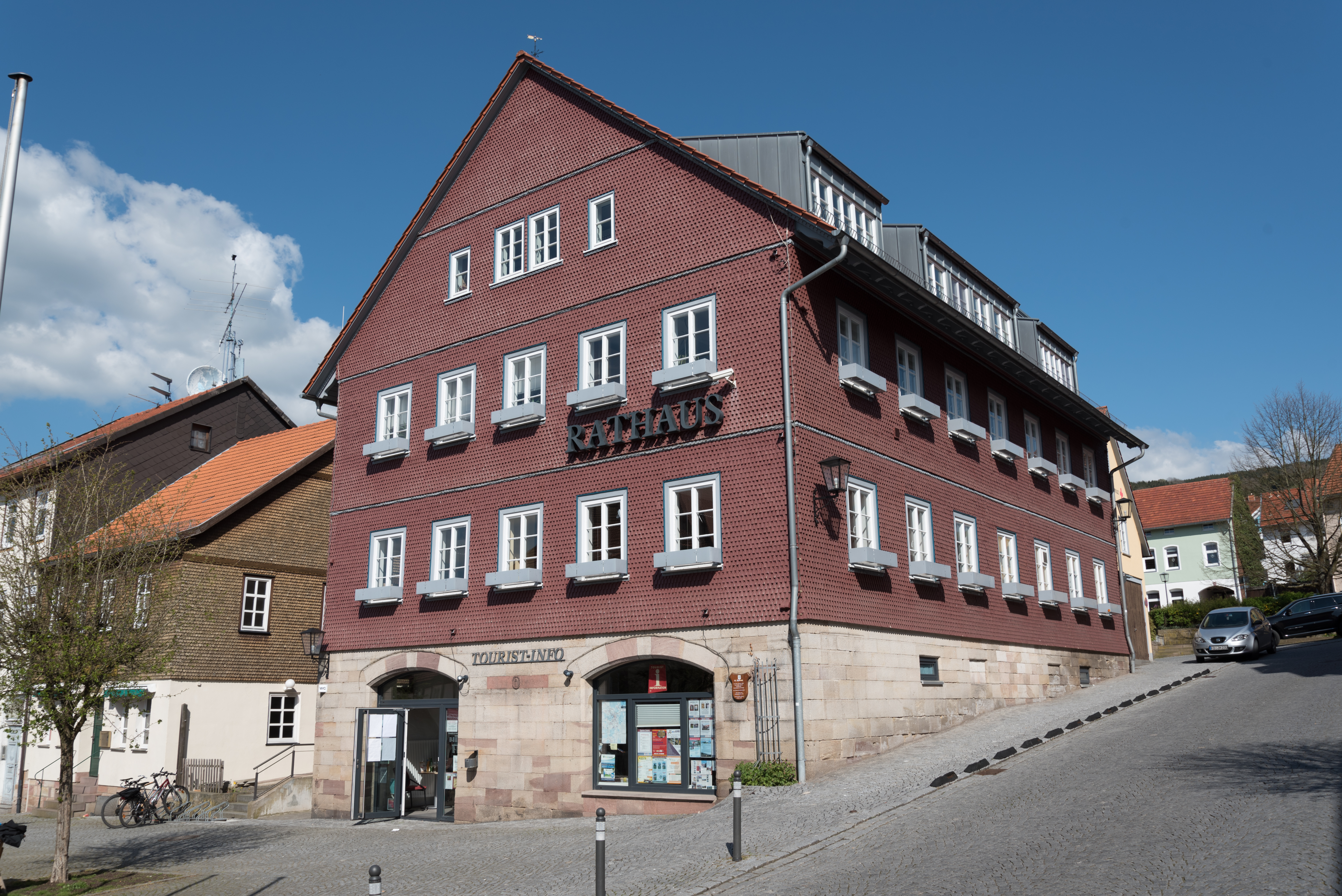 Tann (Rhön), Marktplatz 9